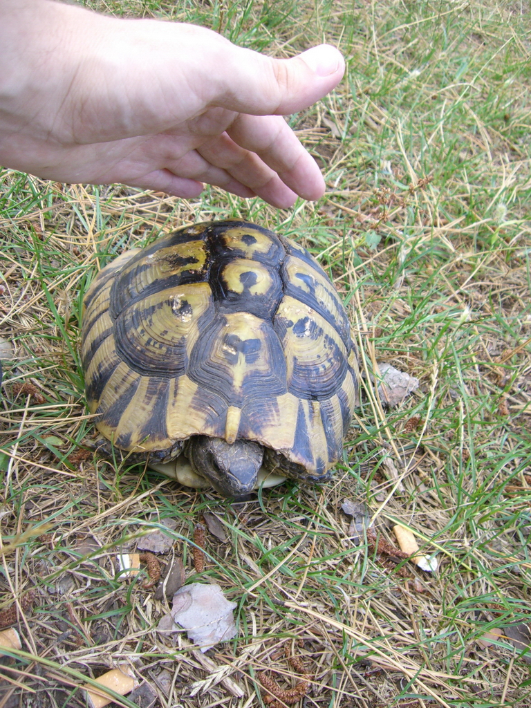 Testudo hermanni boettgeri in Kosovo